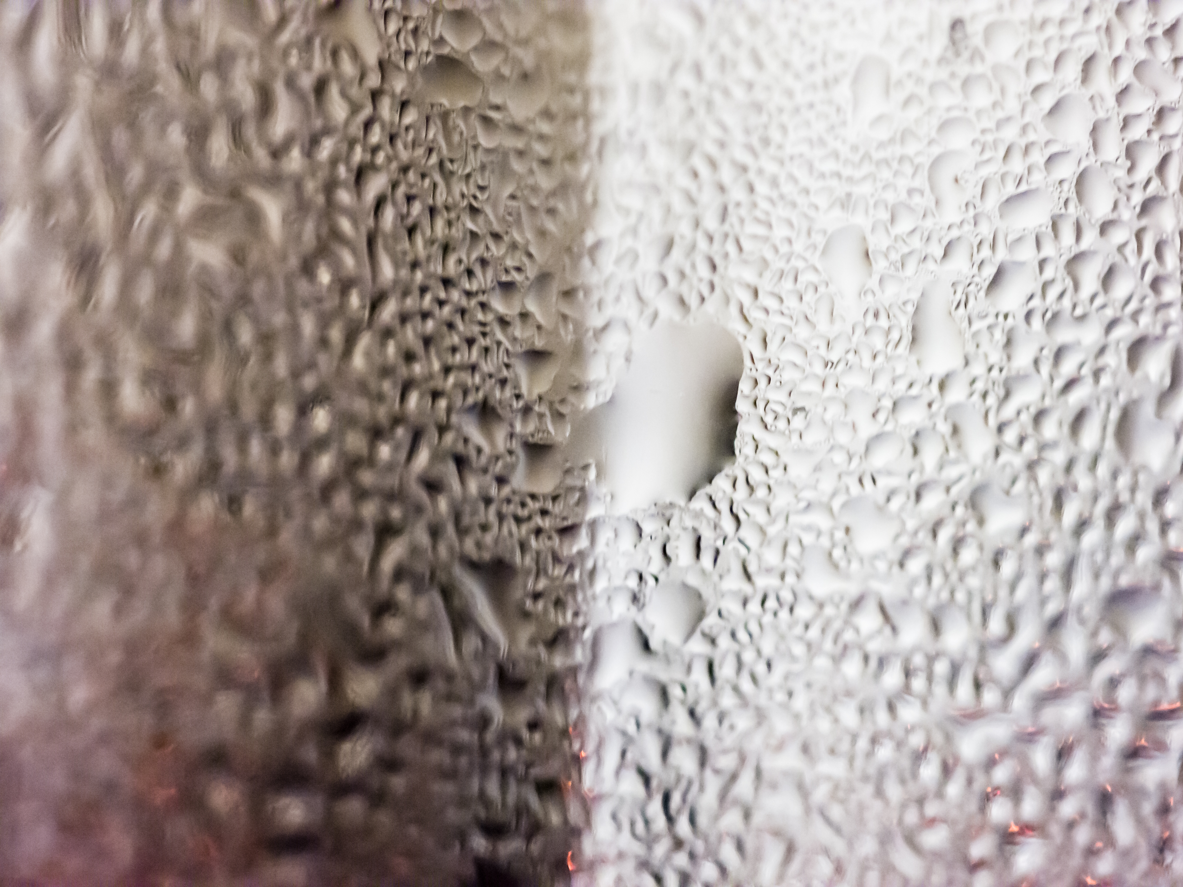 Condensation